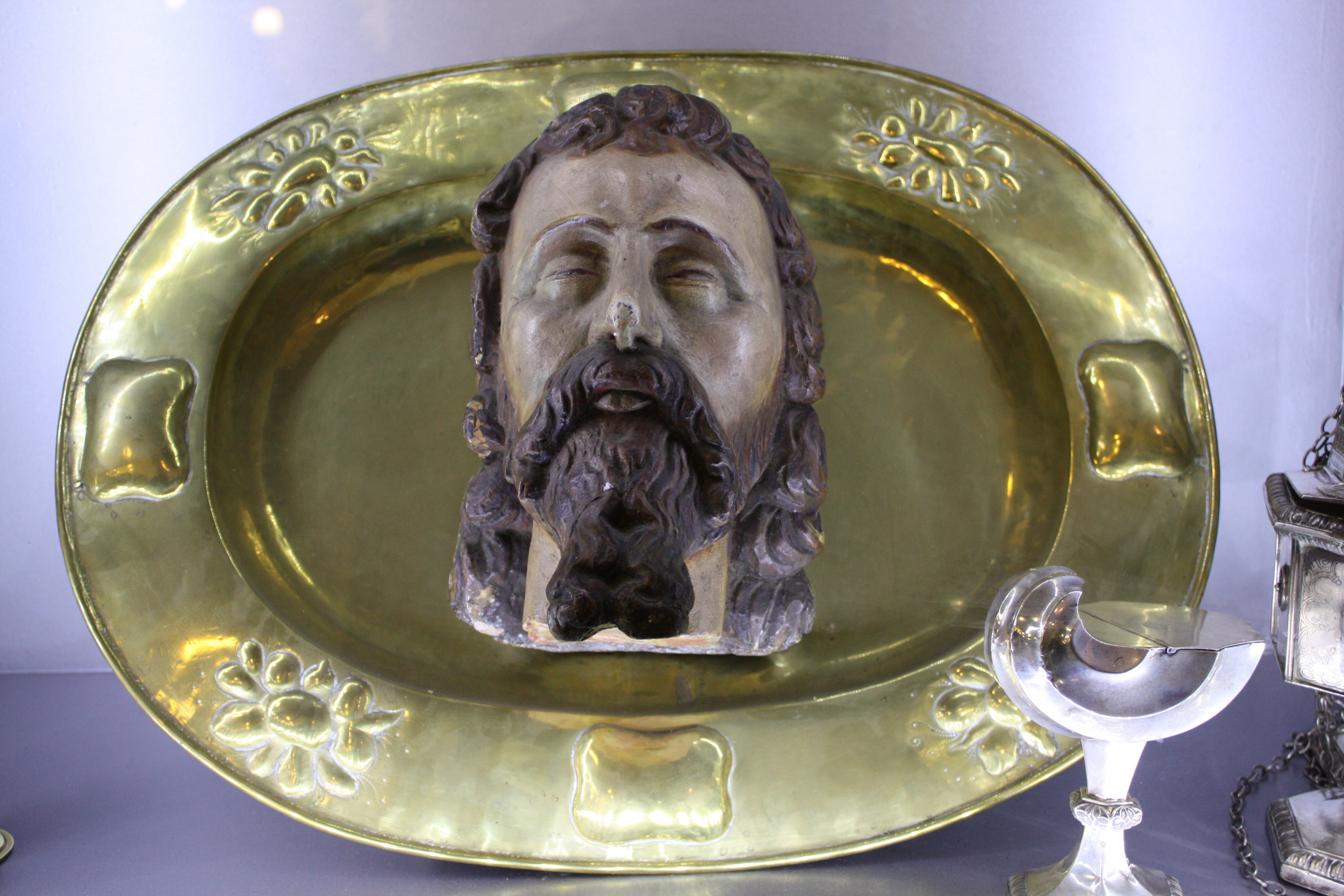 St. Johann Baptist, Kendenich. Relief des Hauptes des hl. Johannes des Täufers auf einer aus Kupfer getriebenen Schüssel ("Johannes-Schüssel"). Geschenk an die Kirche im Jahr 1682 von der Halfenfamilie des Kalscheurer Hofes